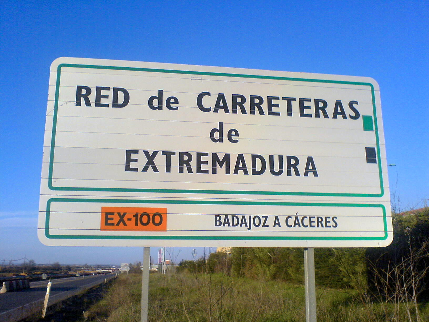 Cartel informativo EX-100. Badajoz.